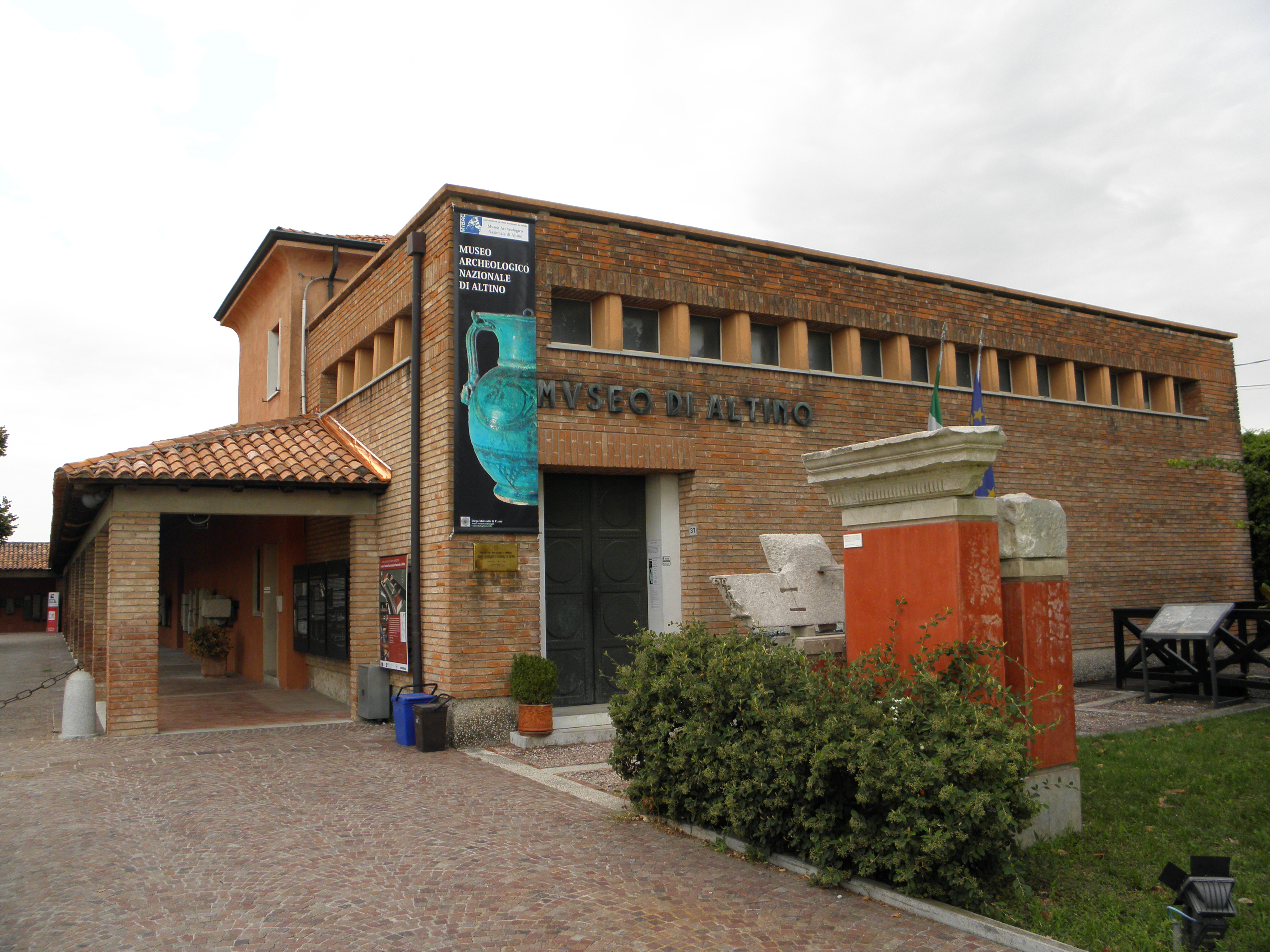 Altino, frazione di Quarto d'Altino: la palazzina sede del Museo Archeologico Nazionale di Altino.